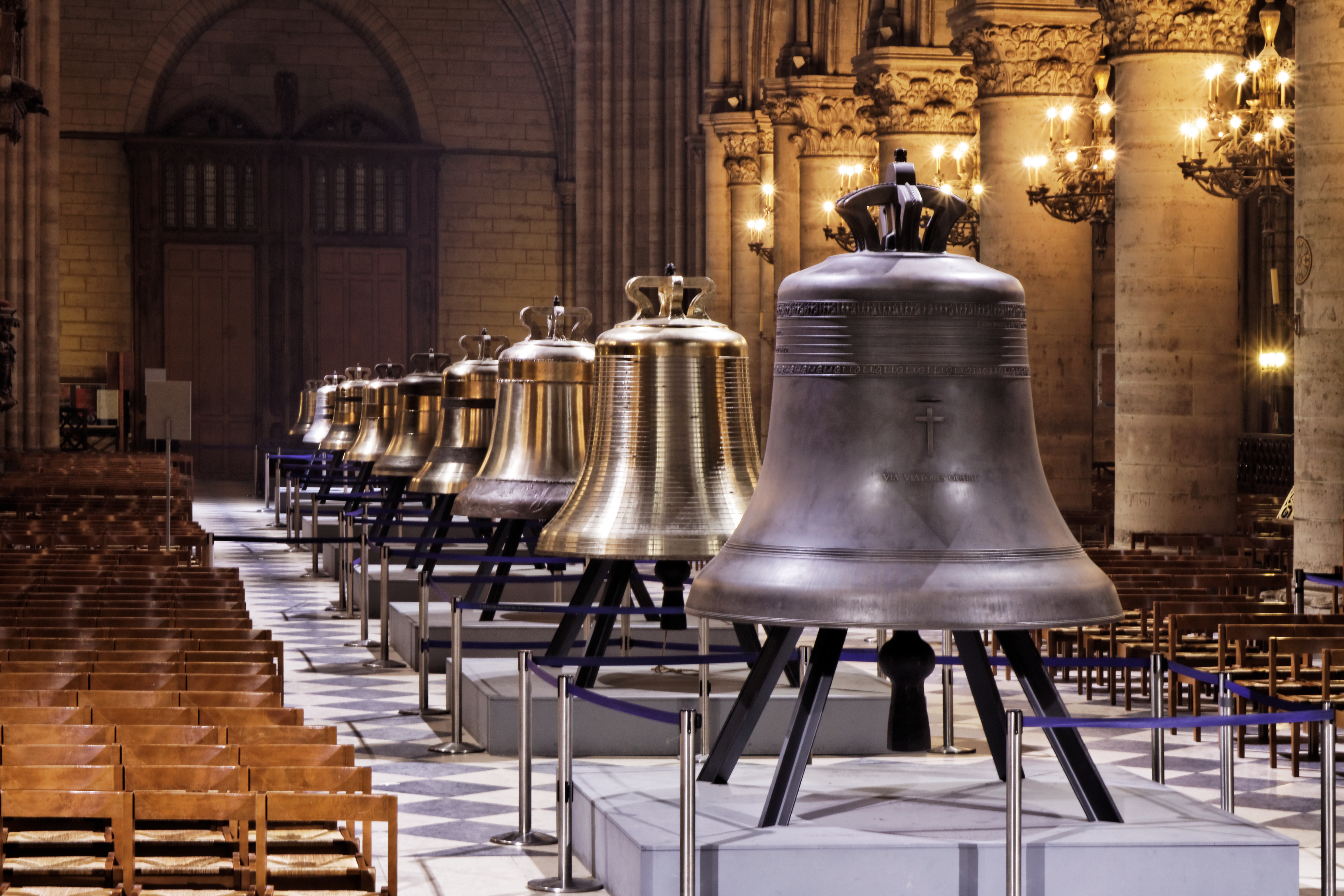 Les nouvelles cloches de la cathédrale Notre-Dame de Paris exposées au public dans la nef du 2 au 25 février 2013 avant leur installation dans les tours du monument. Du premier plan à l'arrière plan : Le bourdon Marie (6,1 tonnes et sonne un sol# octave 2), Gabriel (4,2 tonnes, la# 2), Anne-Geneviève (3,5 tonnes, si 2), Denis (2,5 t, do# 3), Marcel (1,9 t, ré# 3), Étienne (1,5 t, fa 3), Benoît-Joseph (1,3 t, fa# 3 donc à l’octave du bourdon historique Emmanuel), Maurice (1t, sol# 3) et Jean-Marie (782 kg, la# 3). Le bourdon Marie a été réalisé le 14 septembre 2012 par la fonderie Royal Eijsbouts, aux Pays-Bas. Les huit autres cloches ont été coulées par la fonderie Cornille-Havard à Villedieu-les-Poêles (France) : Marcel et Étienne le 3 août 2012 ; Denis, Maurice et Jean-Marie le 16 septembre 2012 ; Gabriel et Benoît-Joseph le 19 novembre 2012 ; Anne-Geneviève le 15 décembre 2012